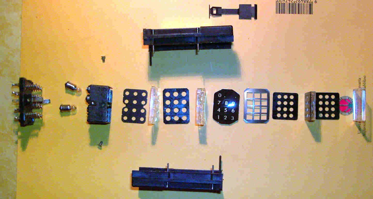 Despiece de un display de proyección